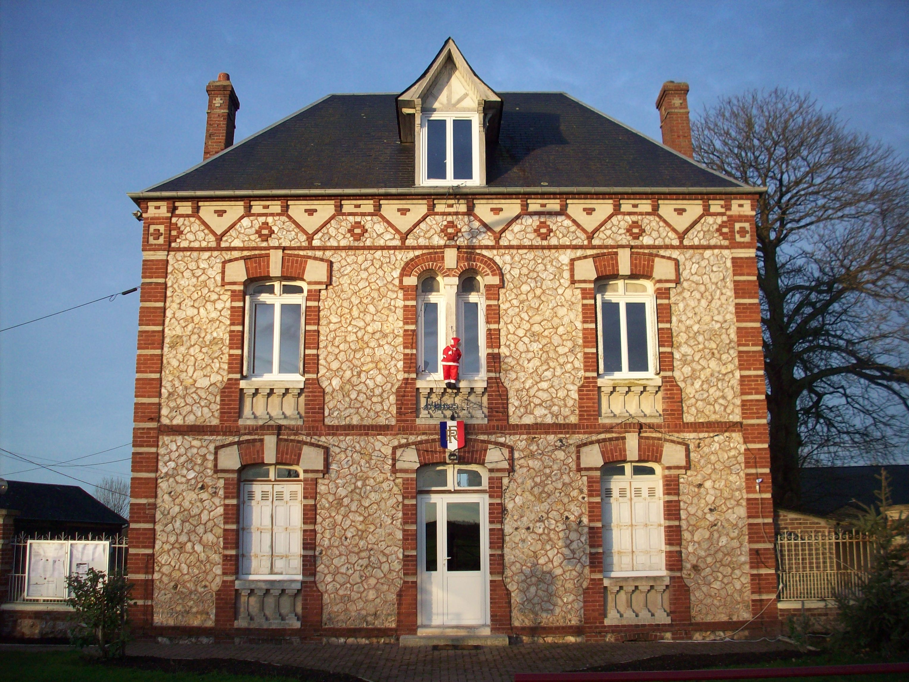 Mairie Appeville-Annebault